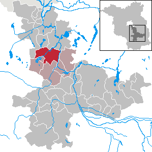 Groß Köris in Brandenburg (Country) - District Dahme-Spreewald